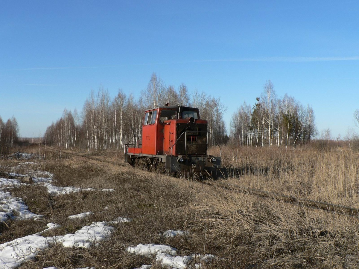 ТУ6Д-0202 на перегоне, УЖД Мезиновского т/пр